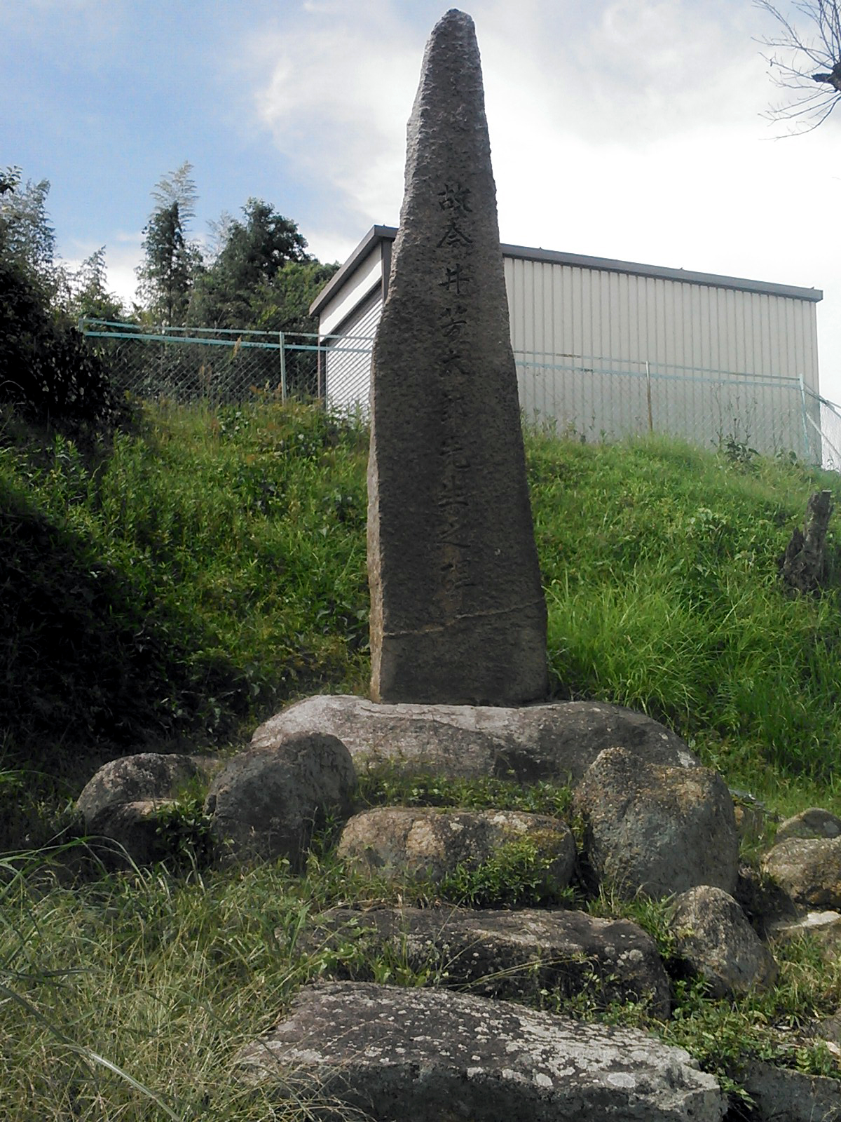 岡山市立馬屋下小学校初代校長、今井芳太郎、顕彰碑。